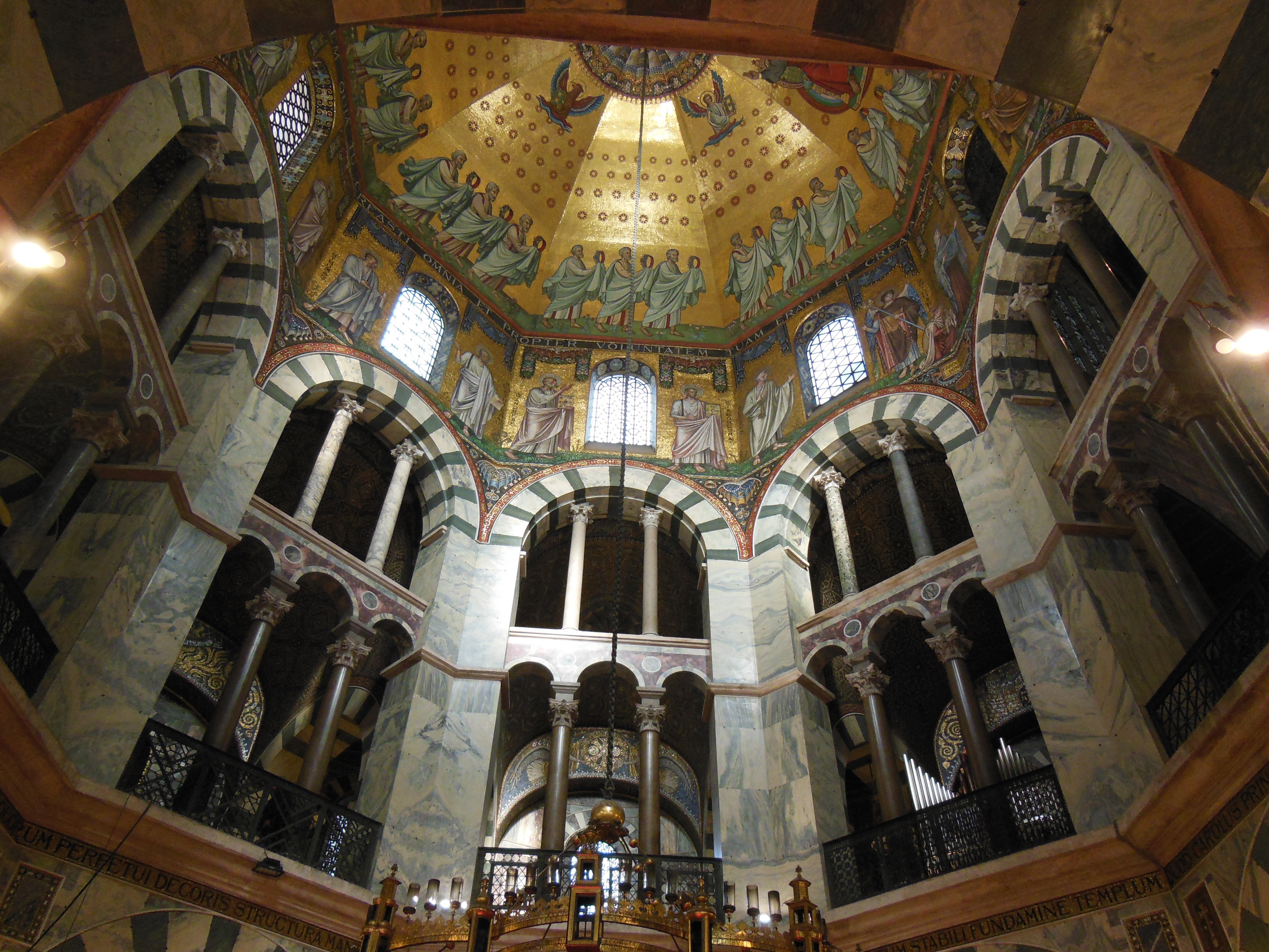 Keleties hatású oktogon alapterület fölé emelkedik a kupola